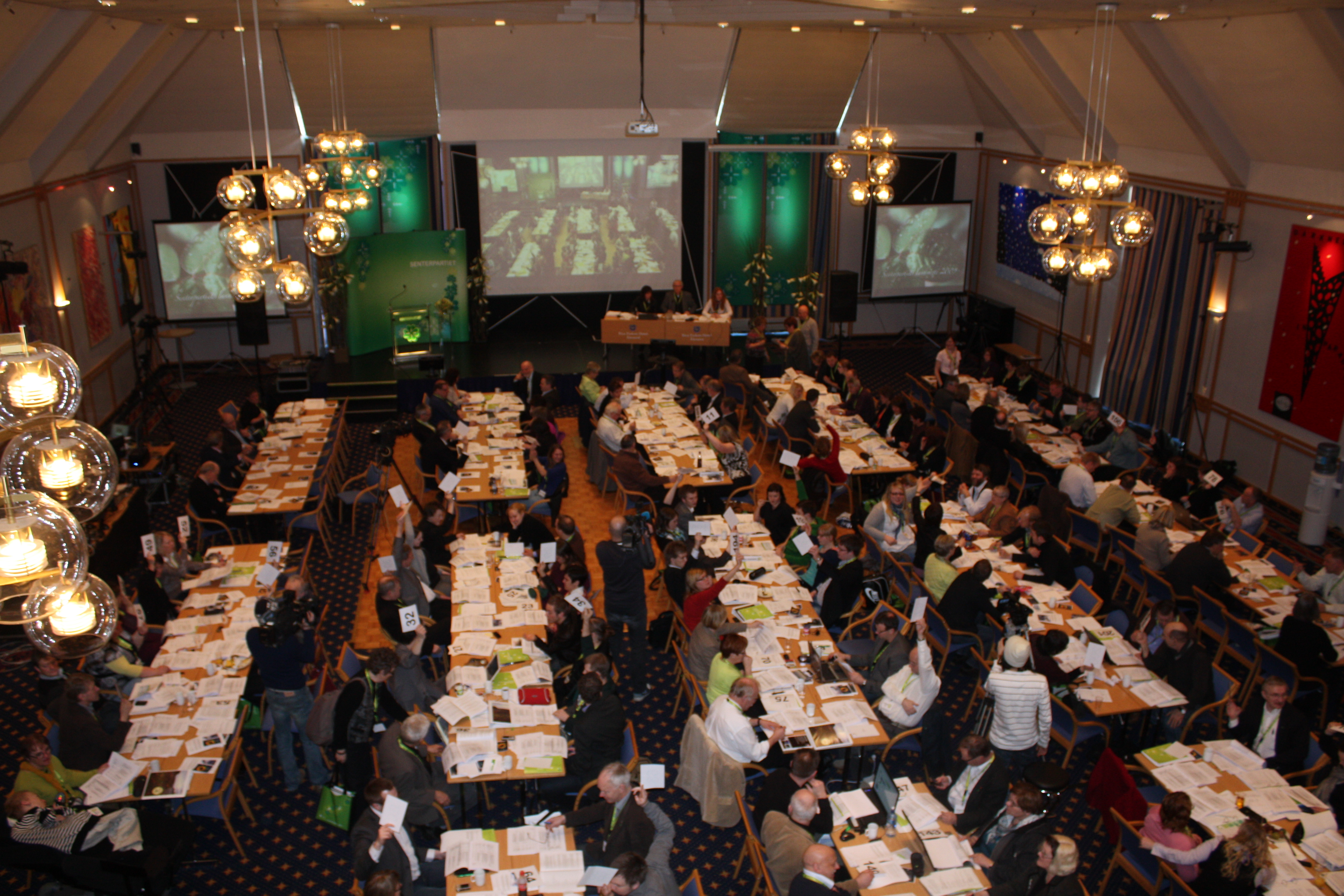 Senterpartiets landsmøte 2009